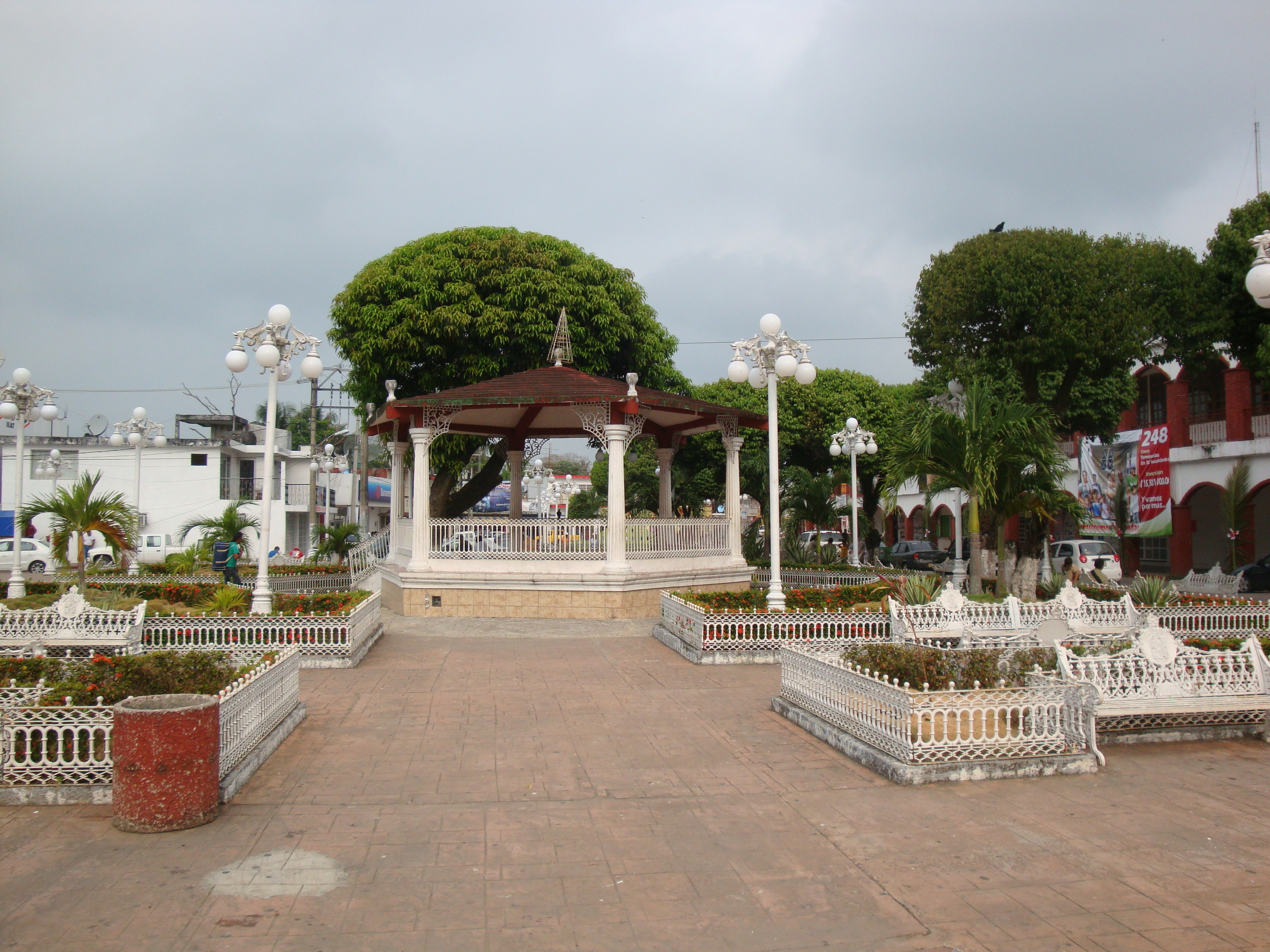 Parque principal de la ciudad de Tacotalpa estado de Tabasco Méxco.